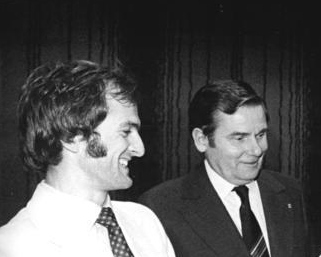 ADN-ZB Mittelstädt 14.12.80 Berlin: Auszeichnung "DDR-Sportler des Jahres 1980"-Zu einem herzlichen Gespräch nach der Ausezichnung im "Palasthotel" kam es zwischen Egon Krenz, Kandidat des Politbüros des ZK der SED und 1. Sekretär des FDJ-Zentralrates (R.), dem Präsidenten des DTSB der DDR, Manfred Ewald, (2.v.l.) und der "DDR-Sportlerin des Jahres 1980", Turn-Olympiasiegerin Maxi Gnauck (3.v.l.), dem "DDR-Sportler des Jahres 1980", Marathon-Olympiasieger Waldemar Cierpinski (l.) und den Mitgliedern der "DDR-Mannschaft des Jahres 1980", dem Olympiasieger im Handball, Rainer Höft (4.v.l.) und Siegfried Voigt (2.v.r.).